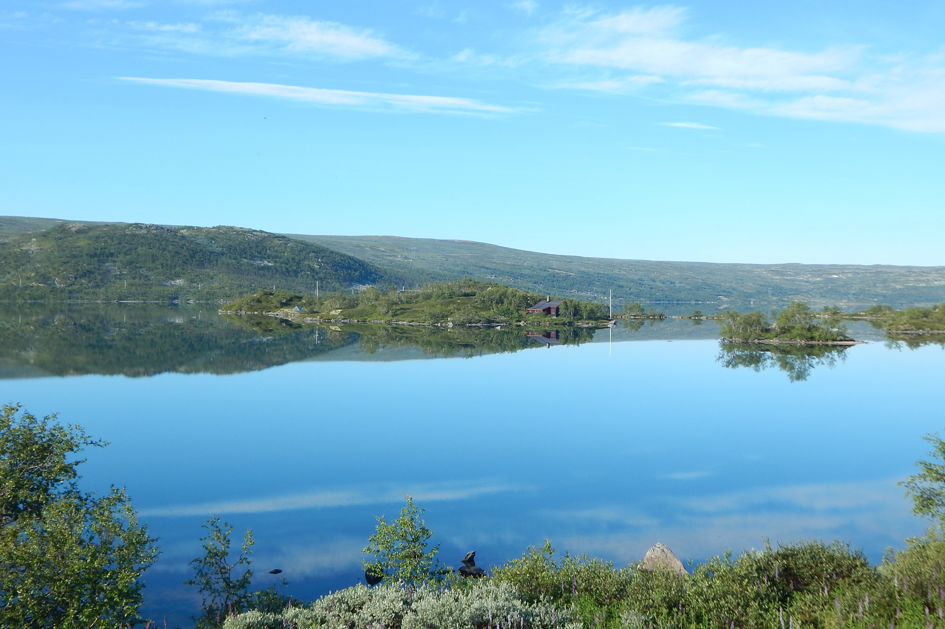 Ustevatn ved Ustaoset stasjon